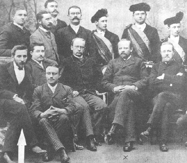 Nella fotografia Pirandello con un gruppo di studenti e professori; il secondo da destra è il prof. Wendelin Foerster che Pirandello affianca in un seminario dedicato all’"Inferno".